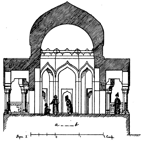 Разрез Ханского судилища в Баку